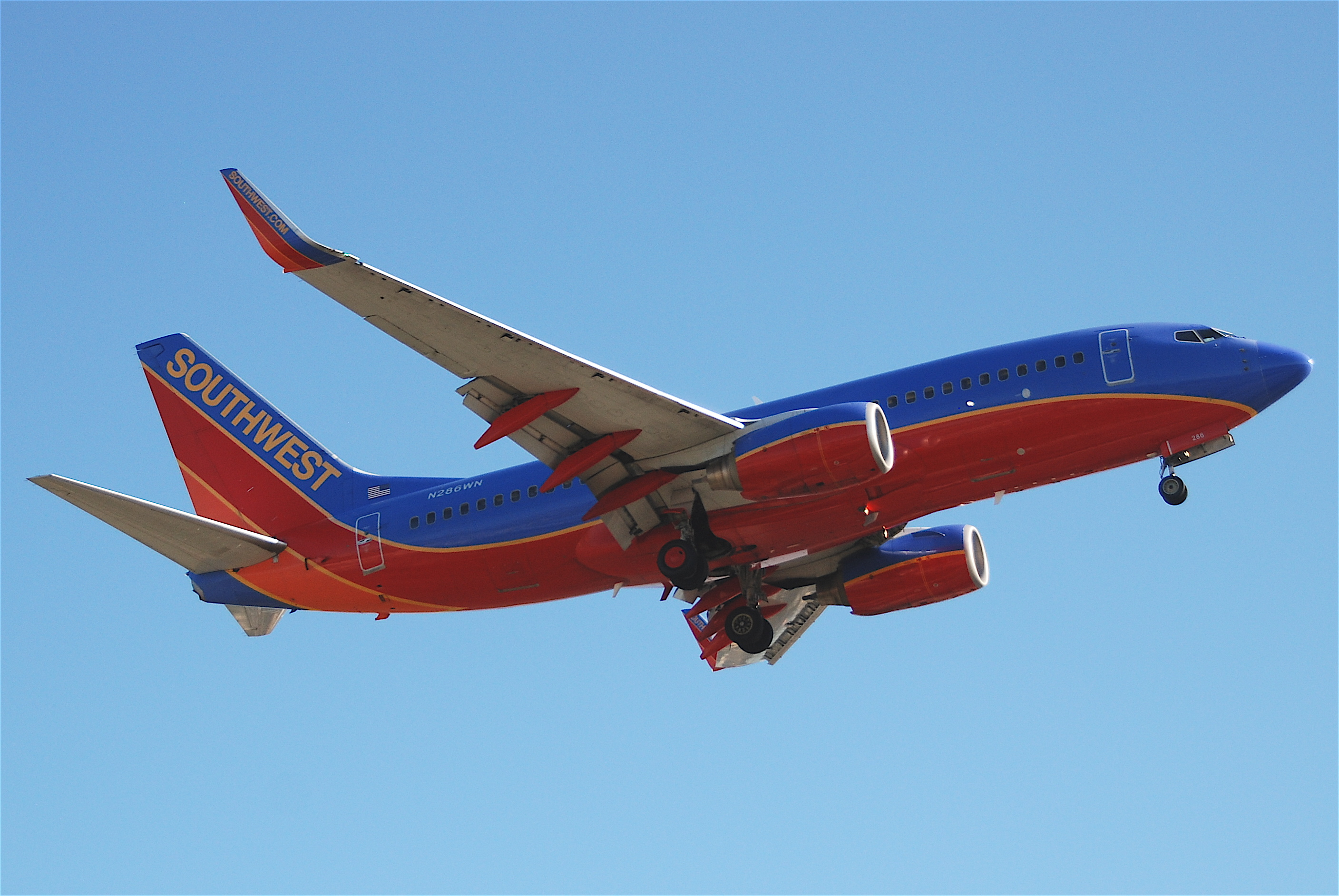 Southwest Airlines Boeing 737-700; N286WN@LAX;08.10.2011/620dz